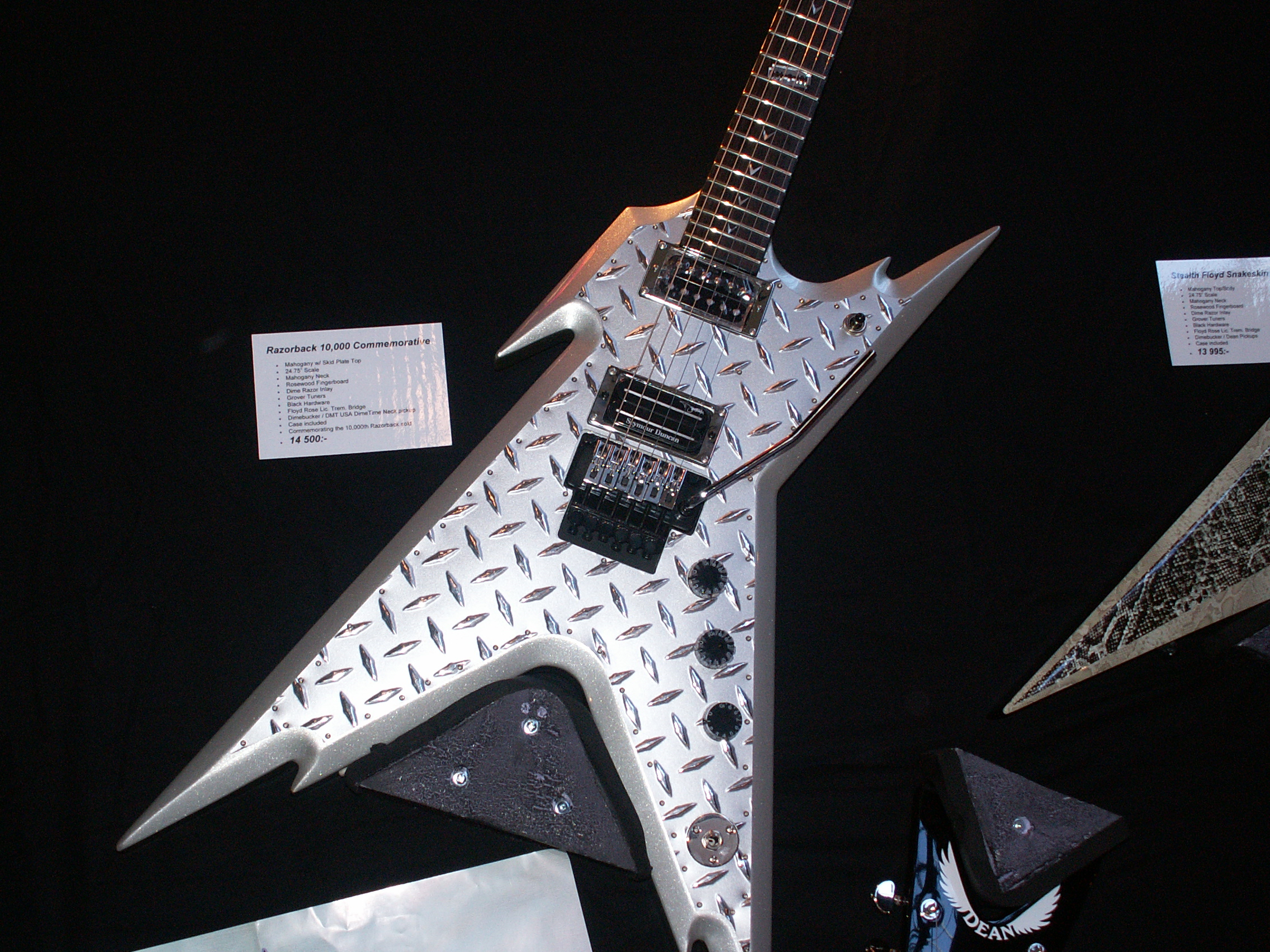 A Dean Guitar